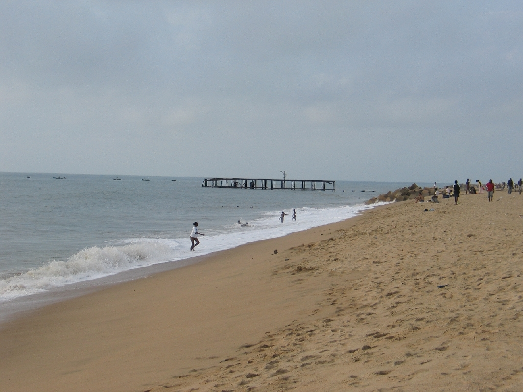 Strand bei Sumbe, Hauptstadt der Provinz Cuanza Sul in Angola